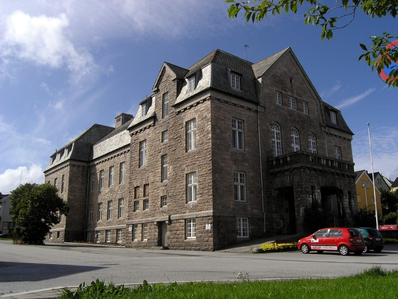 Festiviteten i Kristiansund Foto: Jon Rogne